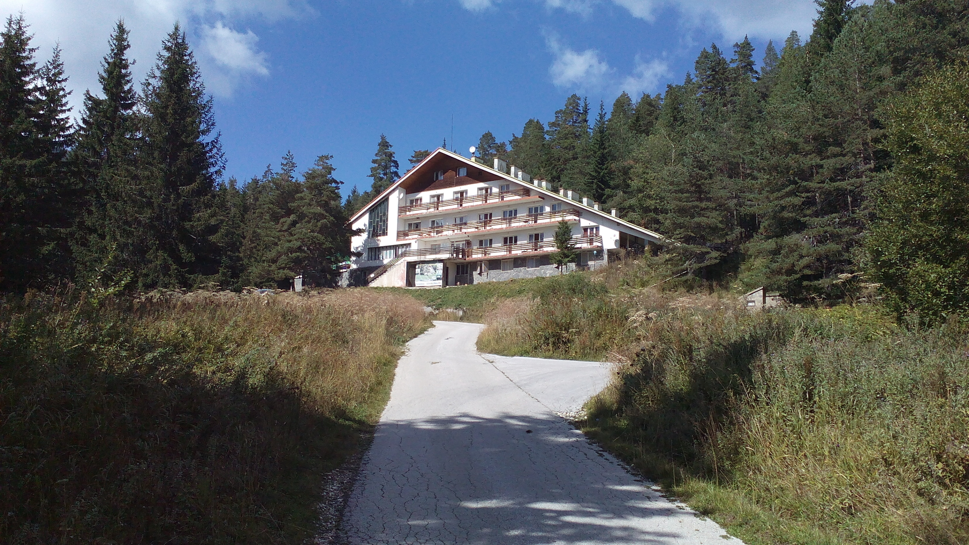 Hut "Skalni mostove" in the Rhodopes, Bulgaria